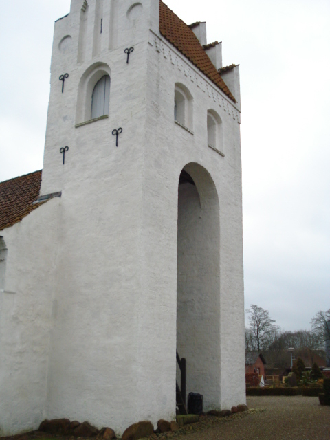 Blegind Kirke / Blegind Church, Jutland, Denmark